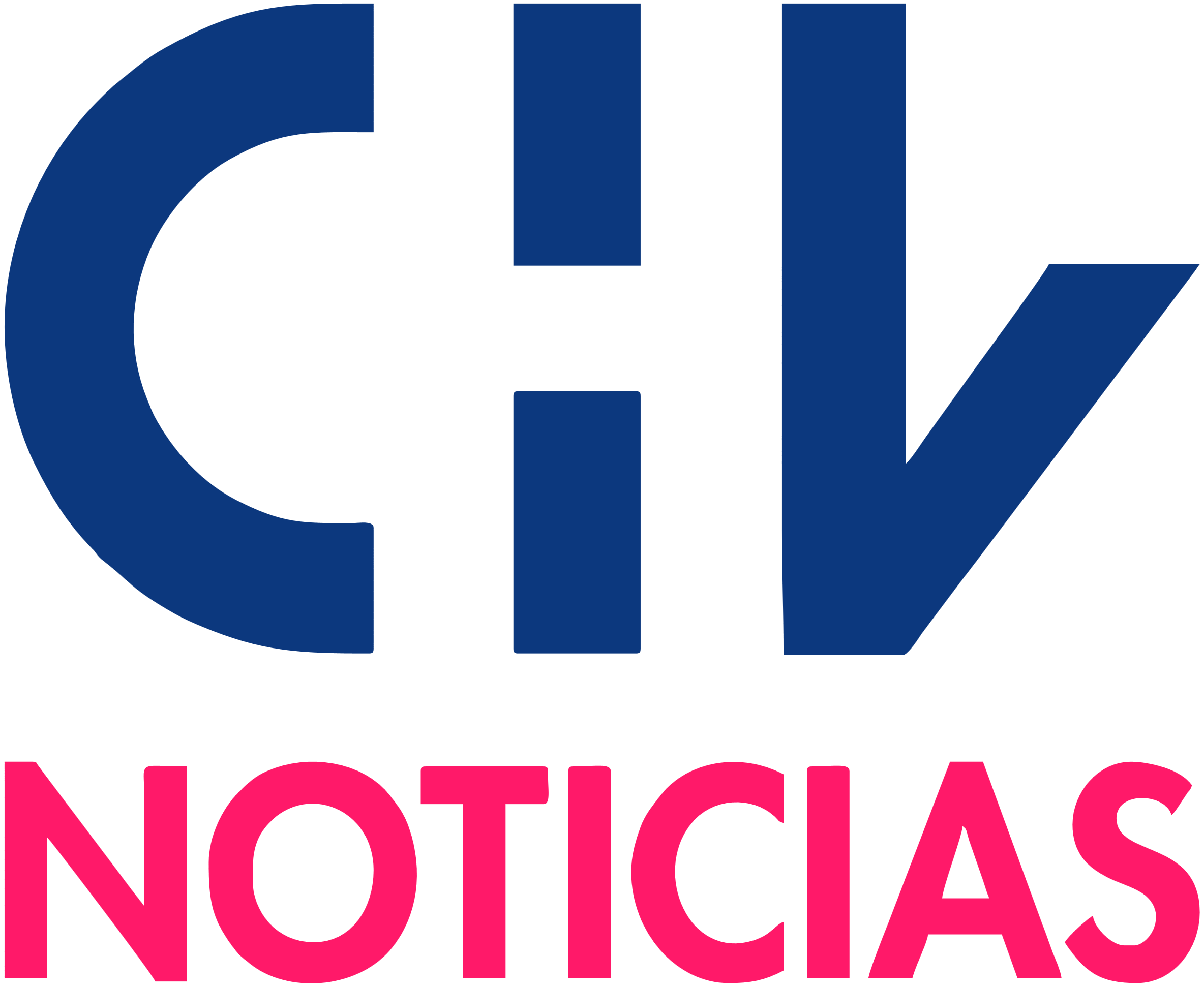 Emblema de CHV Noticias desde el 16 de febrero de 2018.